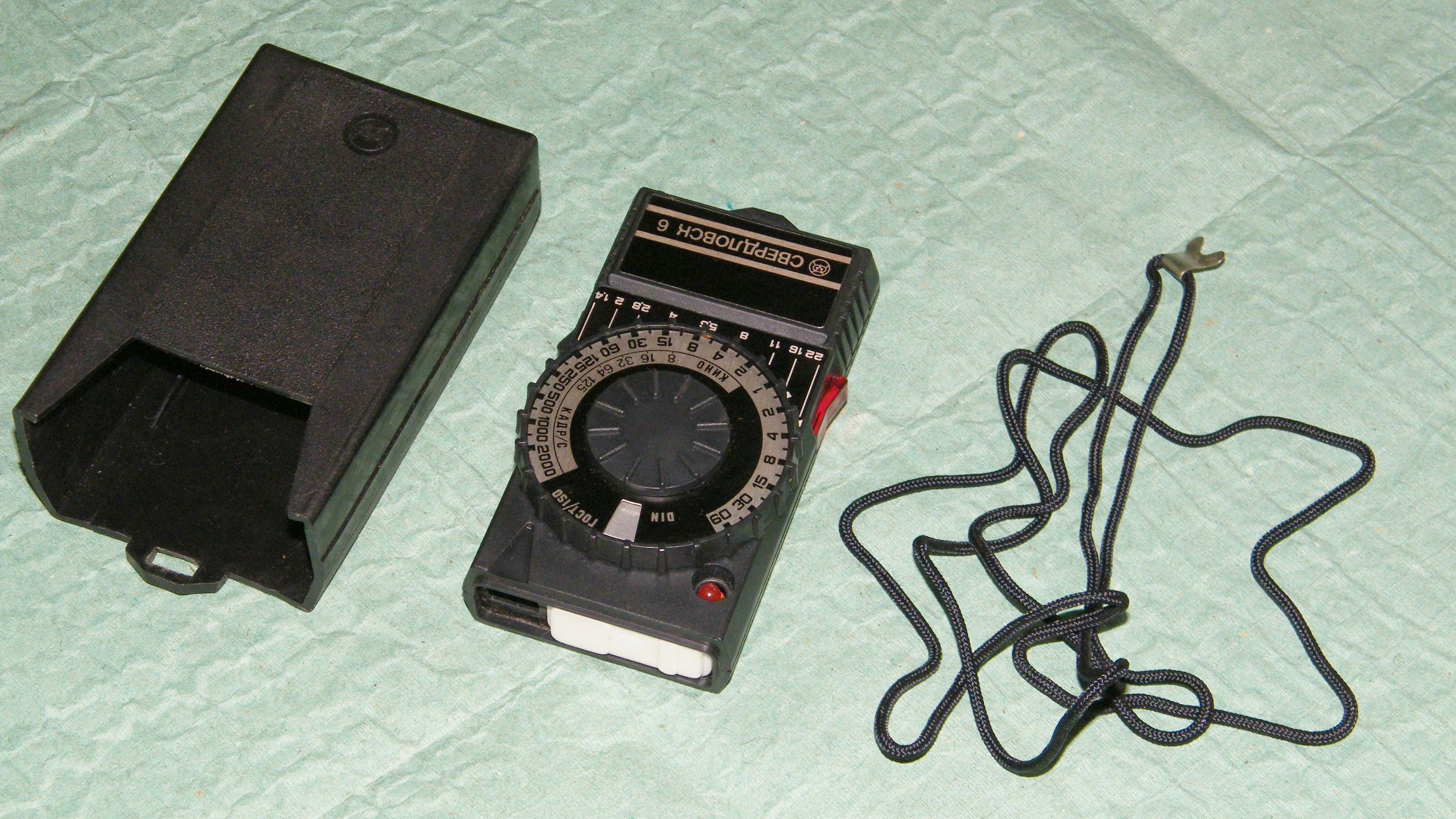 Фотоэкспонометр Свердловск-6